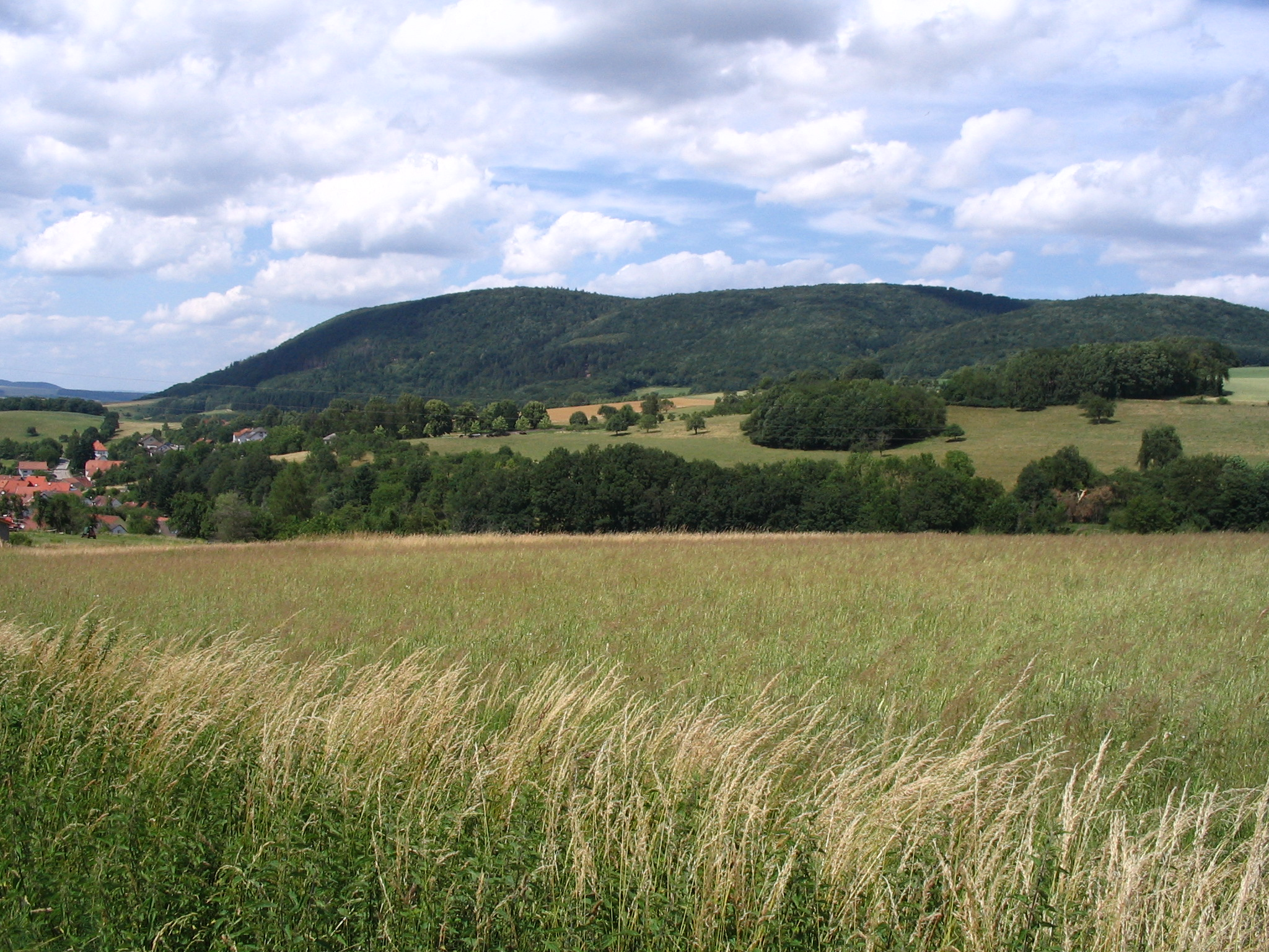 Der Königsberg von Westen